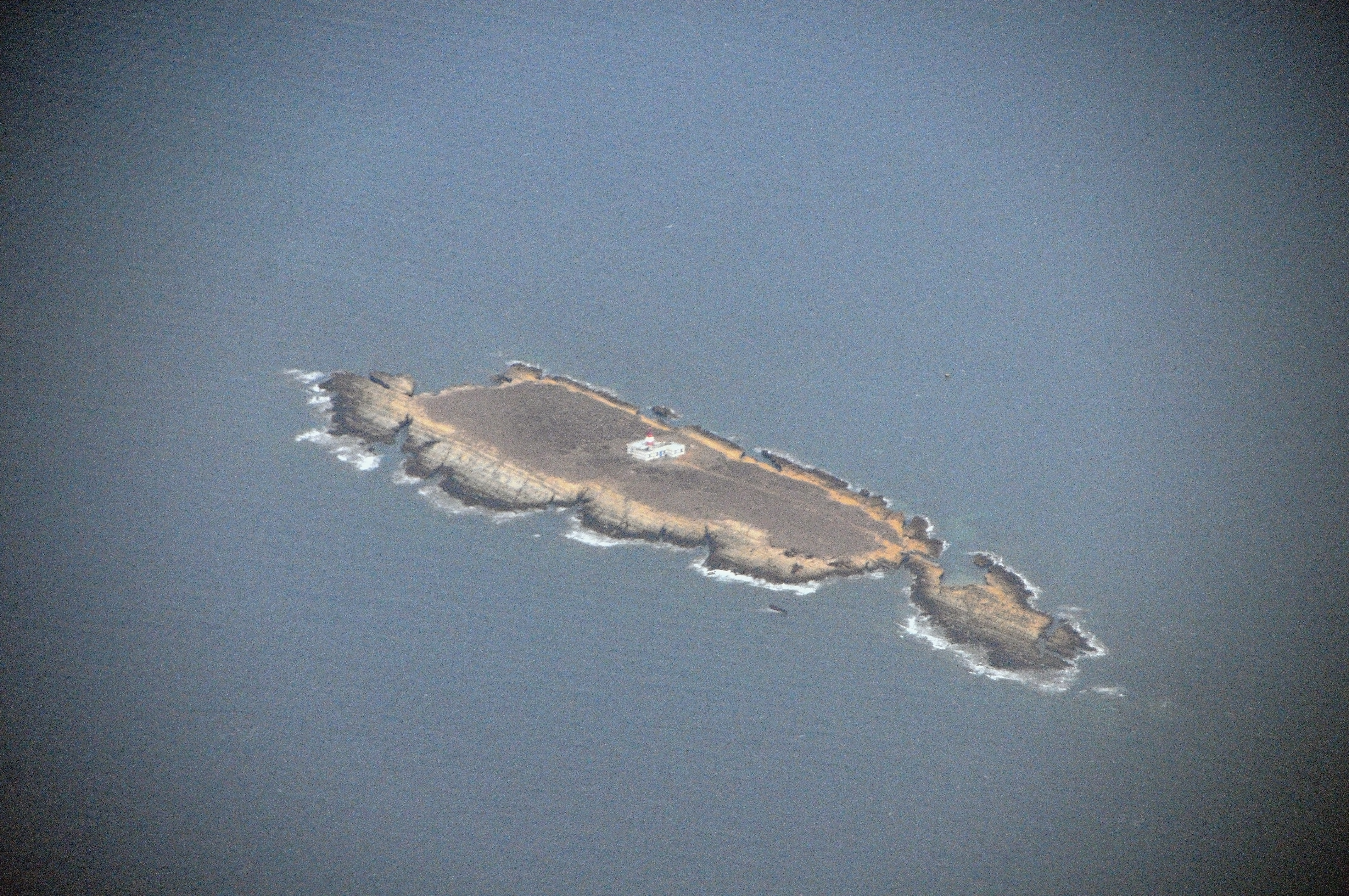 Vue aérienne de l'île plane au large de cap farina, nord est de la Tunisie.